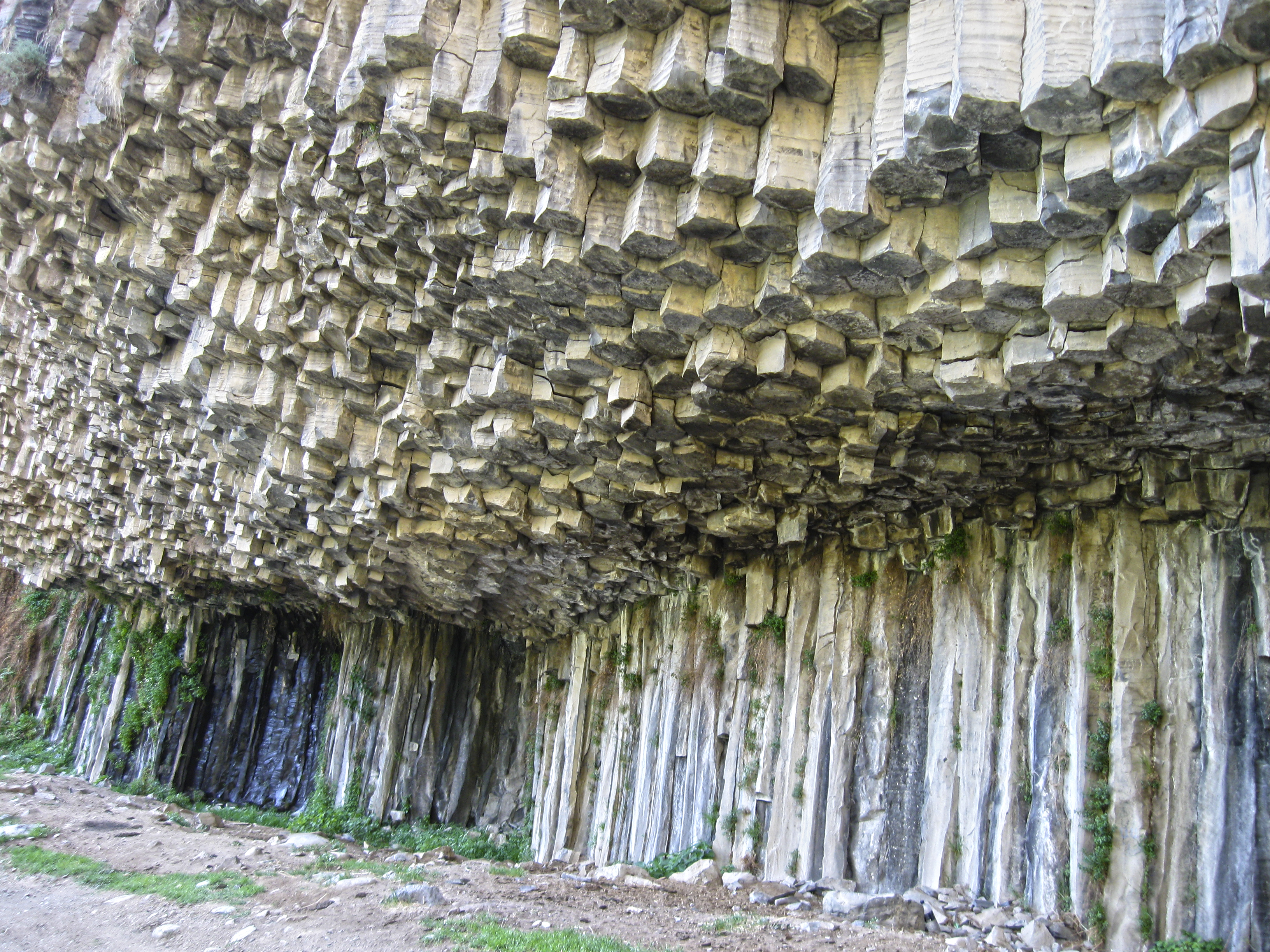 Քարերի սիմֆոնիան